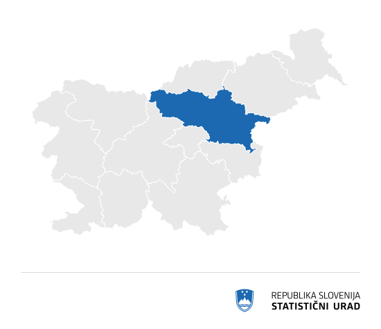 regije